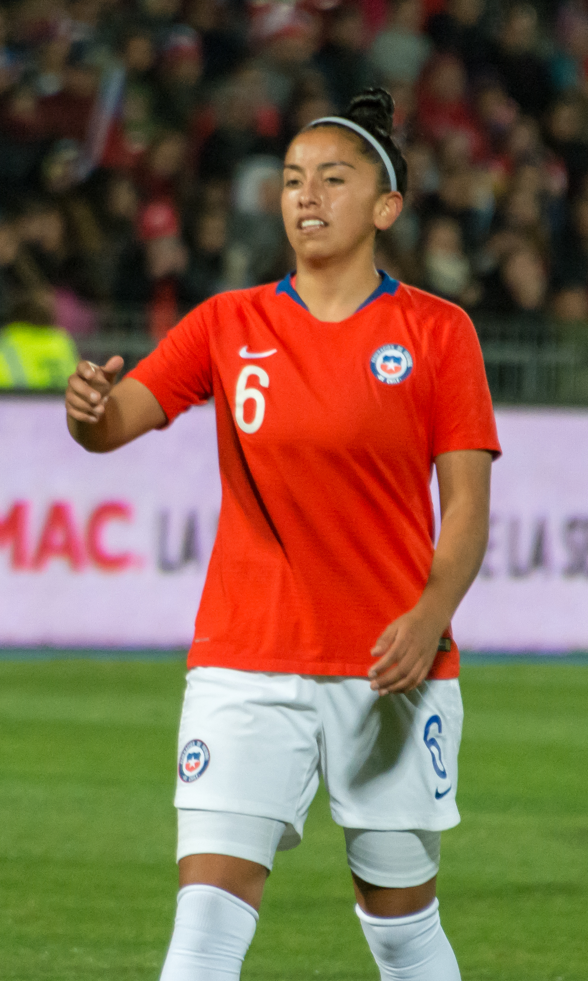 Claudia Soto, Chile v Colombia, Estadio Nacional, Ñuñoa, Santiago, Chile.